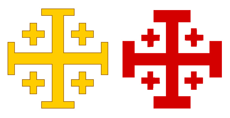 Иерусалимский крест, который используется либо золотым, либо красным.